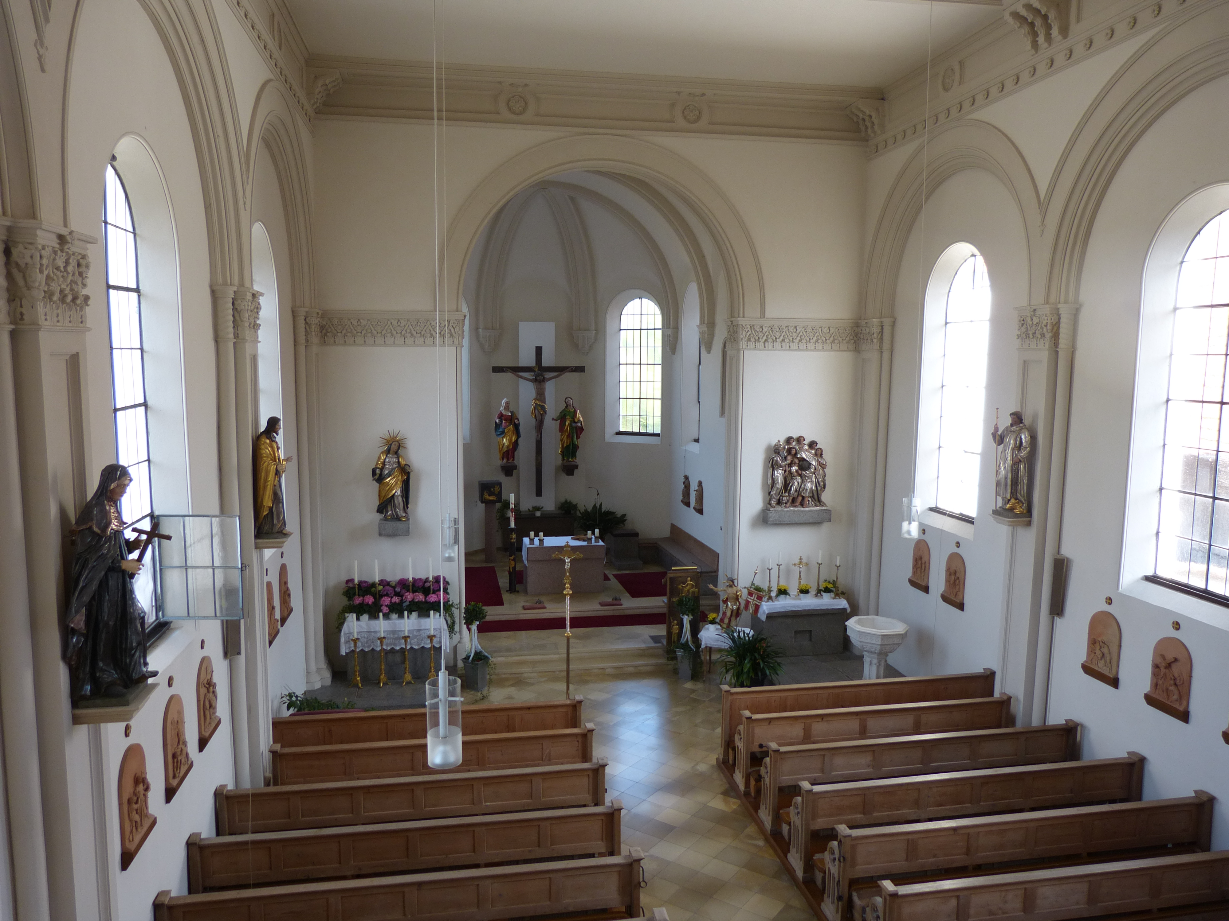 Heilige Sieben Brüder, Unterrieden, Landkreis Unterallgäu, Bayern